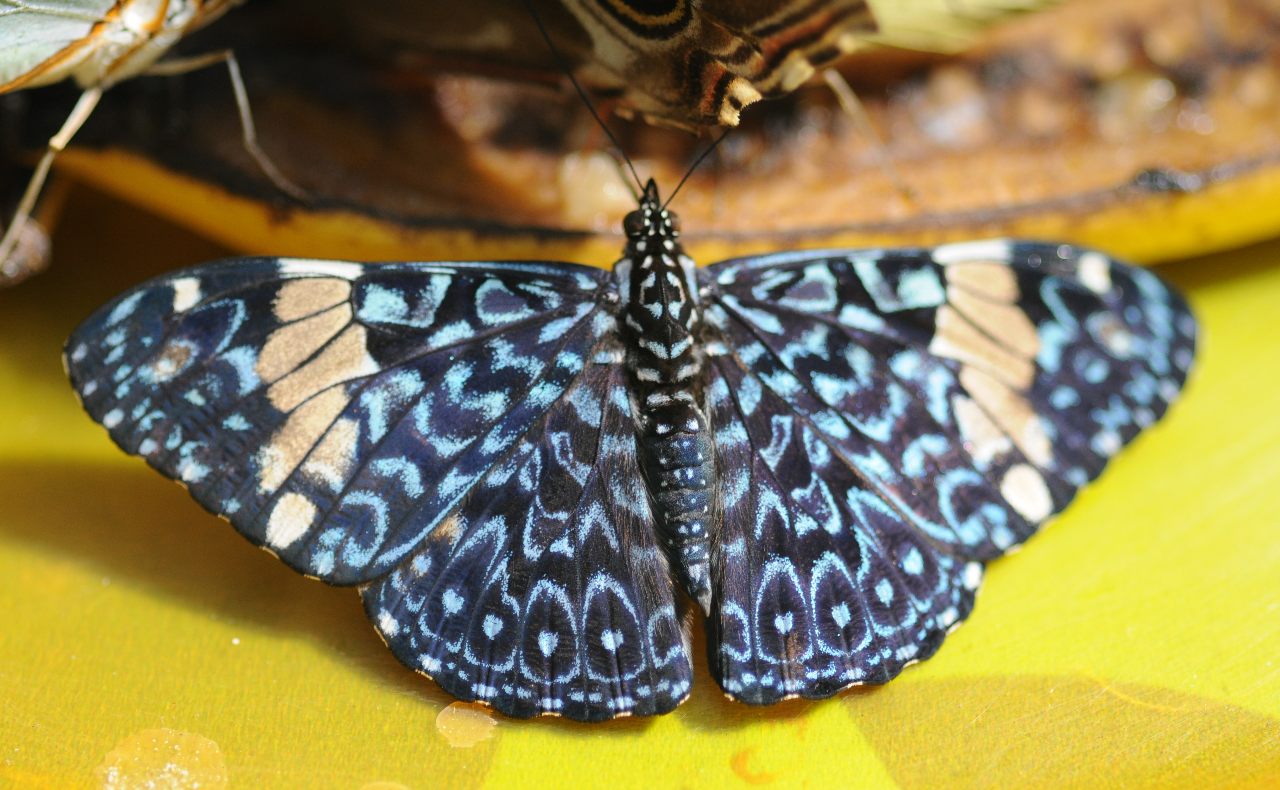 Lépidoptère